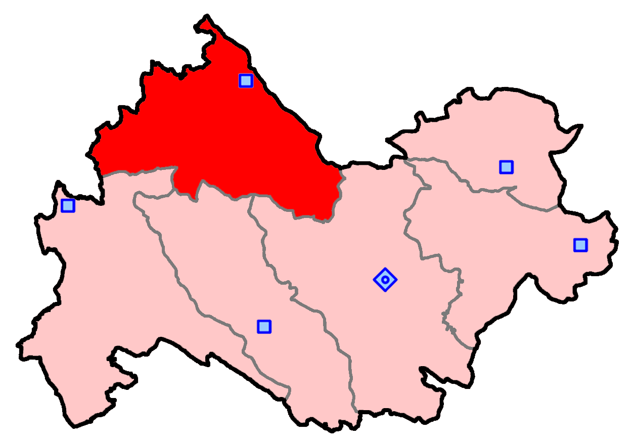 حوزه‌ پاوه برای انتخابات مجلس شورای اسلامی